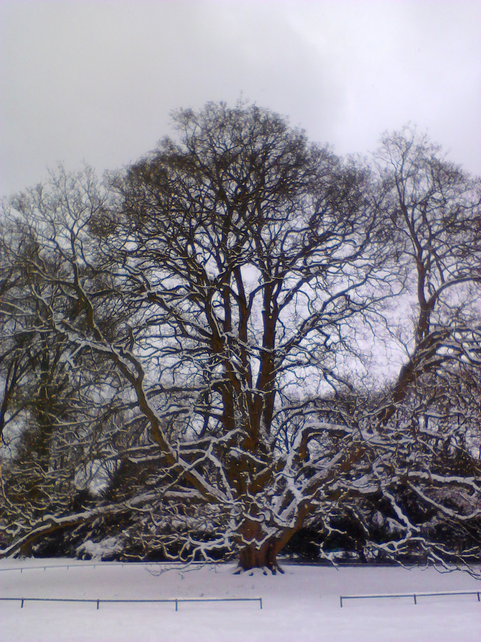 Bergahorn im Hirschpark; Hamburg-Ottensen This is a photograph of an architectural monument.